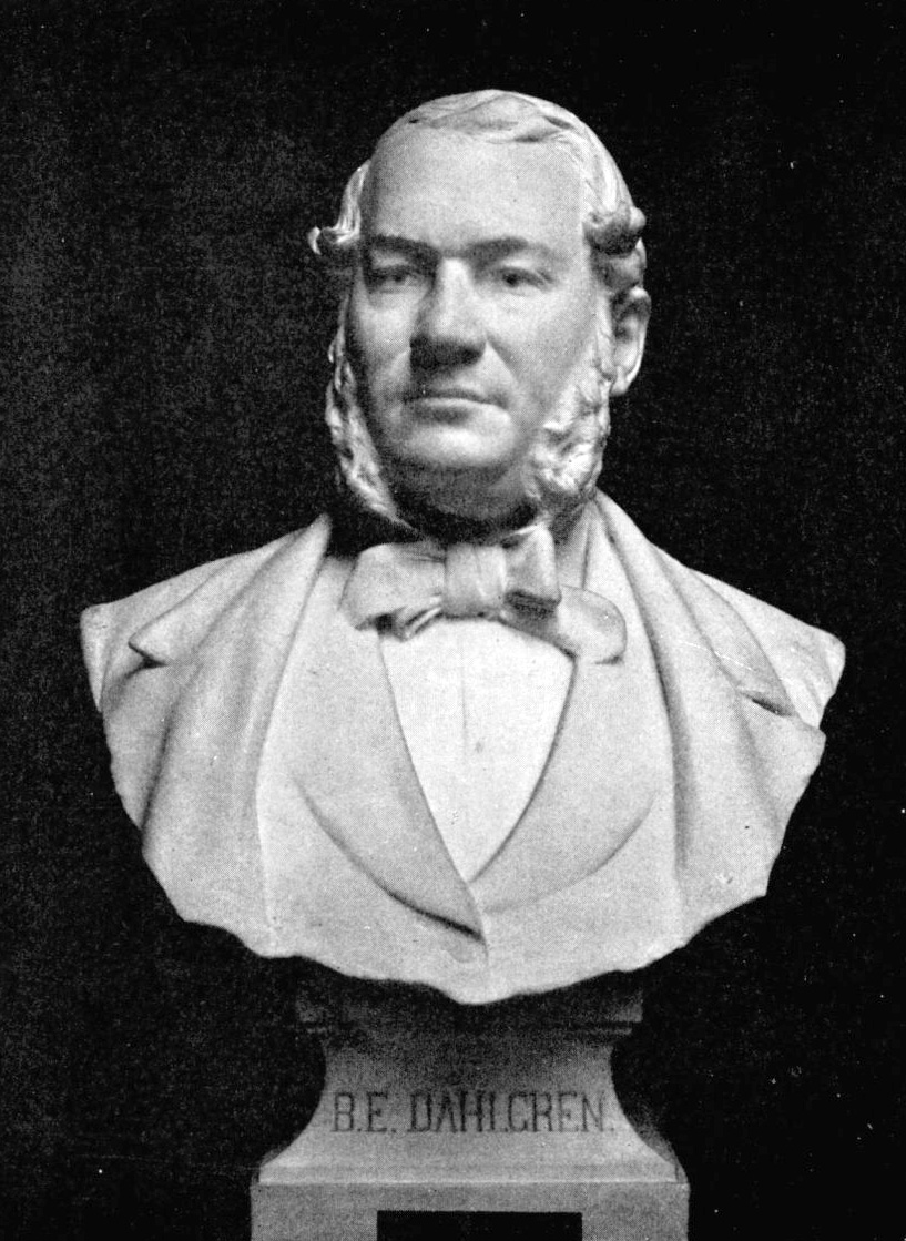 Bengt Erland Dahlgren ((1809-1876). Byst i marmor 143 cm hög jämte sockel.